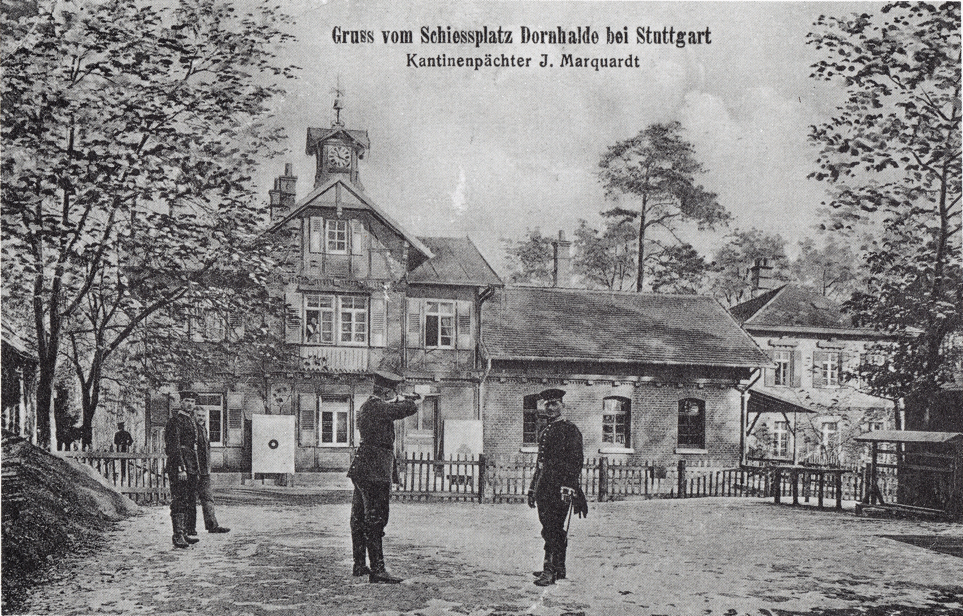 Garnisonsschützenhauses in Stuttgart-Degerloch, Ansichtskarte.